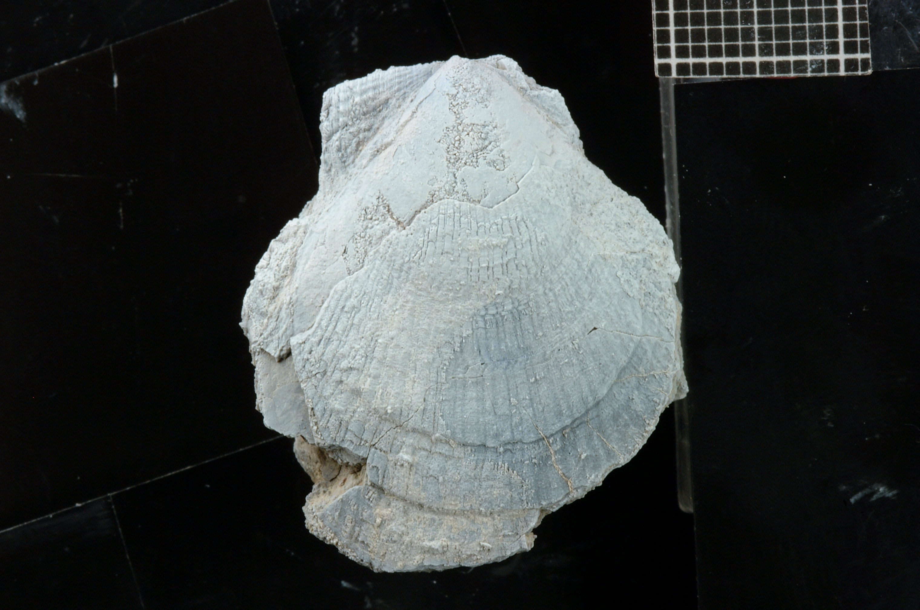 Valva izquierda del bivalvo fósil del Cretácico inferior Mimachlamys robinaldina, proveniente de estratos de la Formación Agrio, en la Patagonia Argentina.